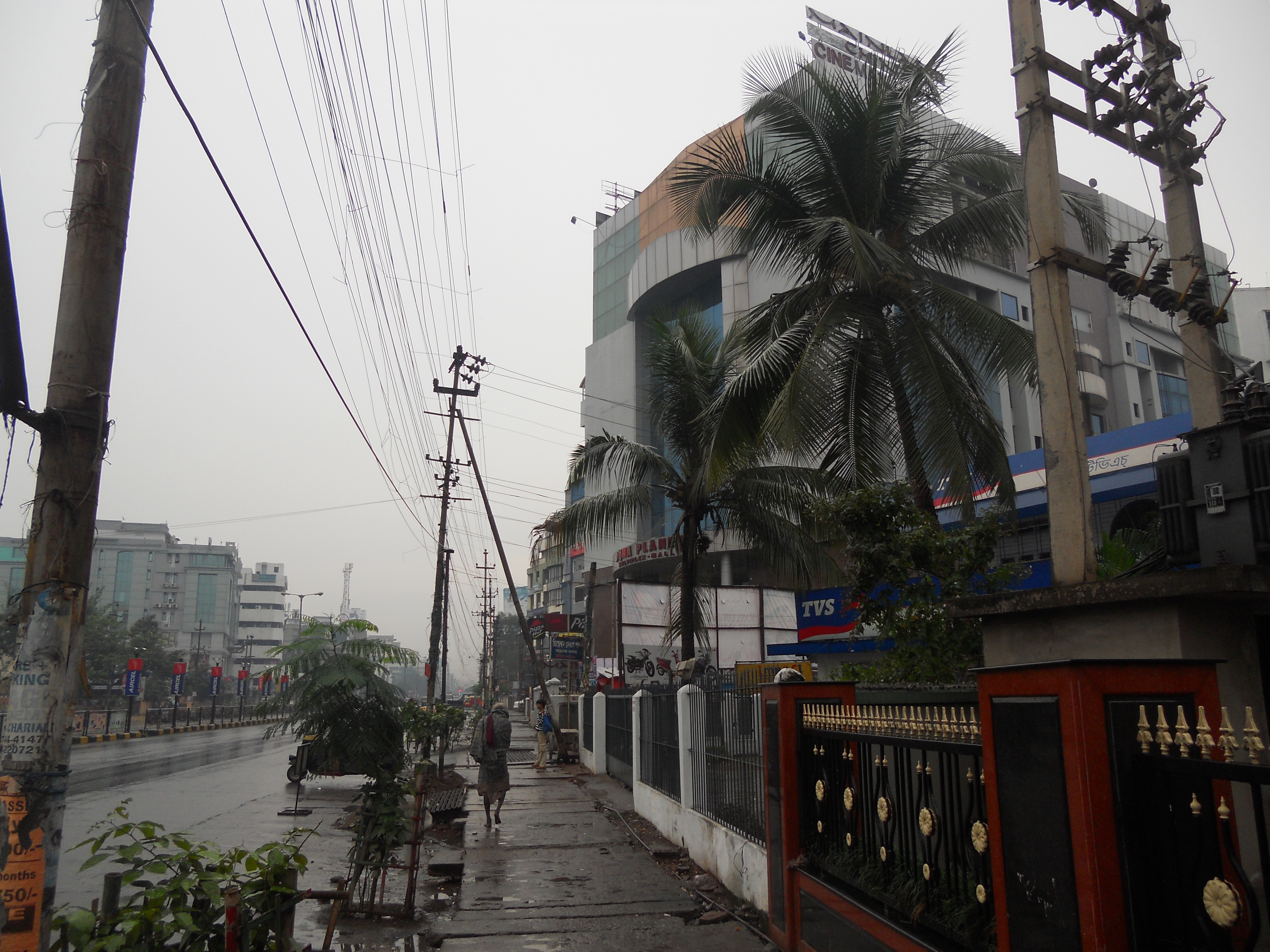 GS ROAD,GUWAHATI